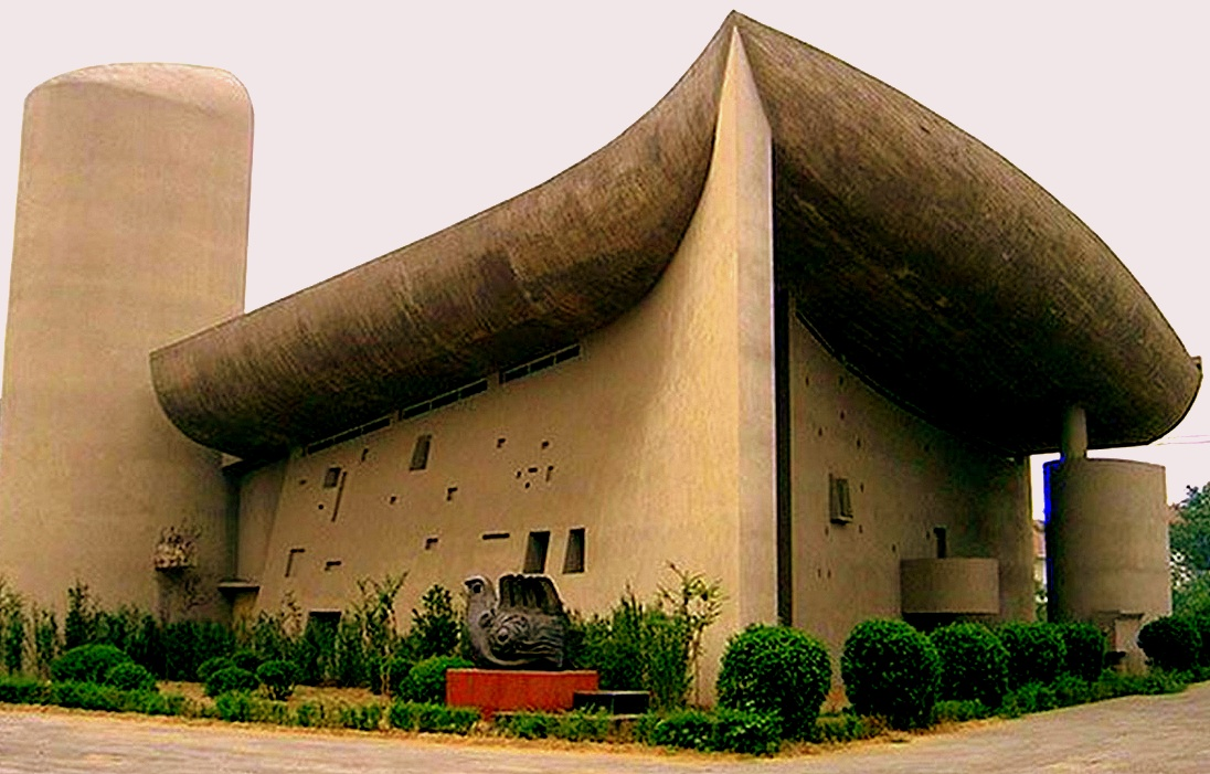 Exemple de duplitecture, copie de la chapelle de Ronchamp de Le Corbusier à Zhengzhou en Chine.